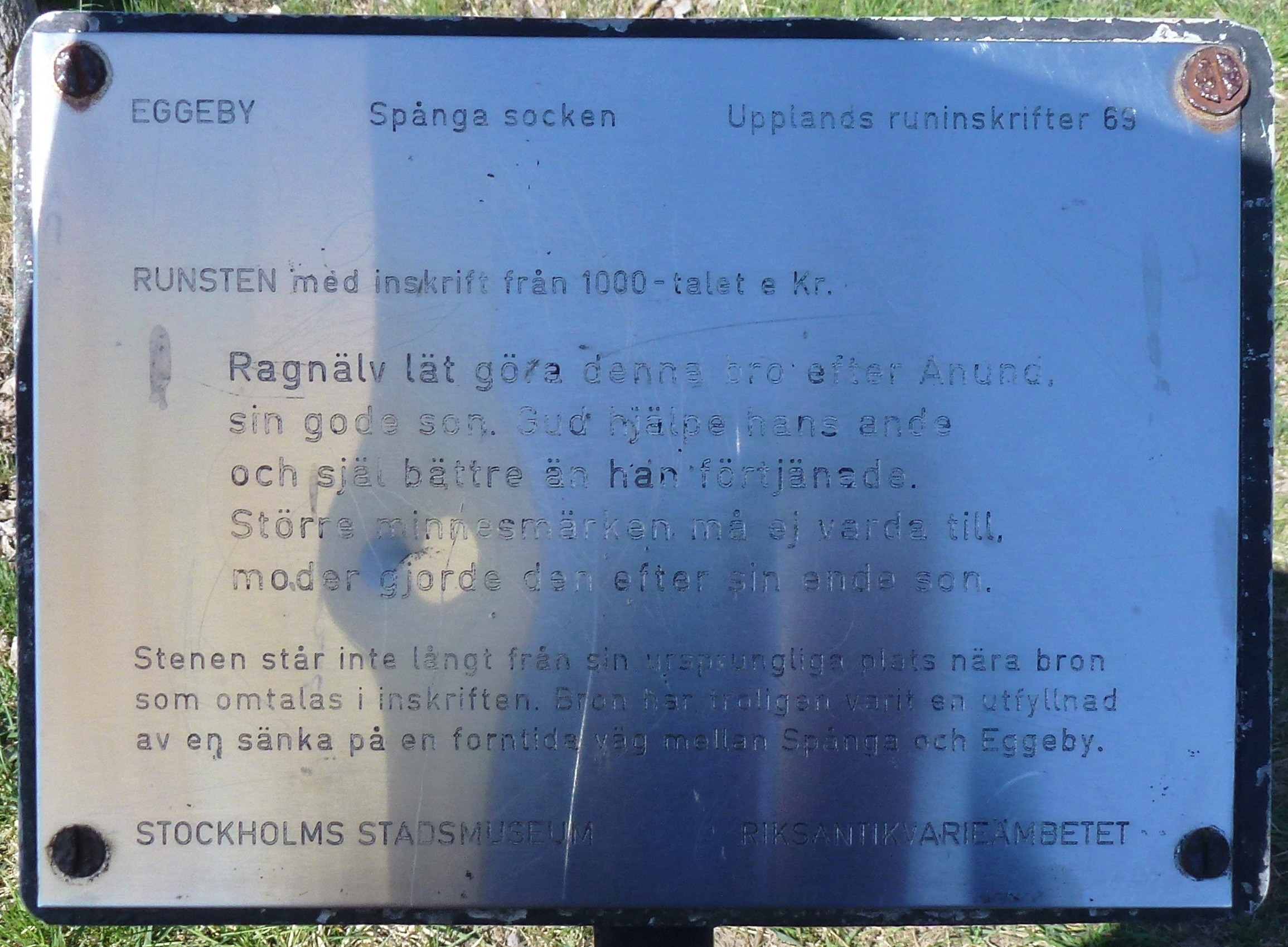 Upplands runinskrifter 69, infoskylt